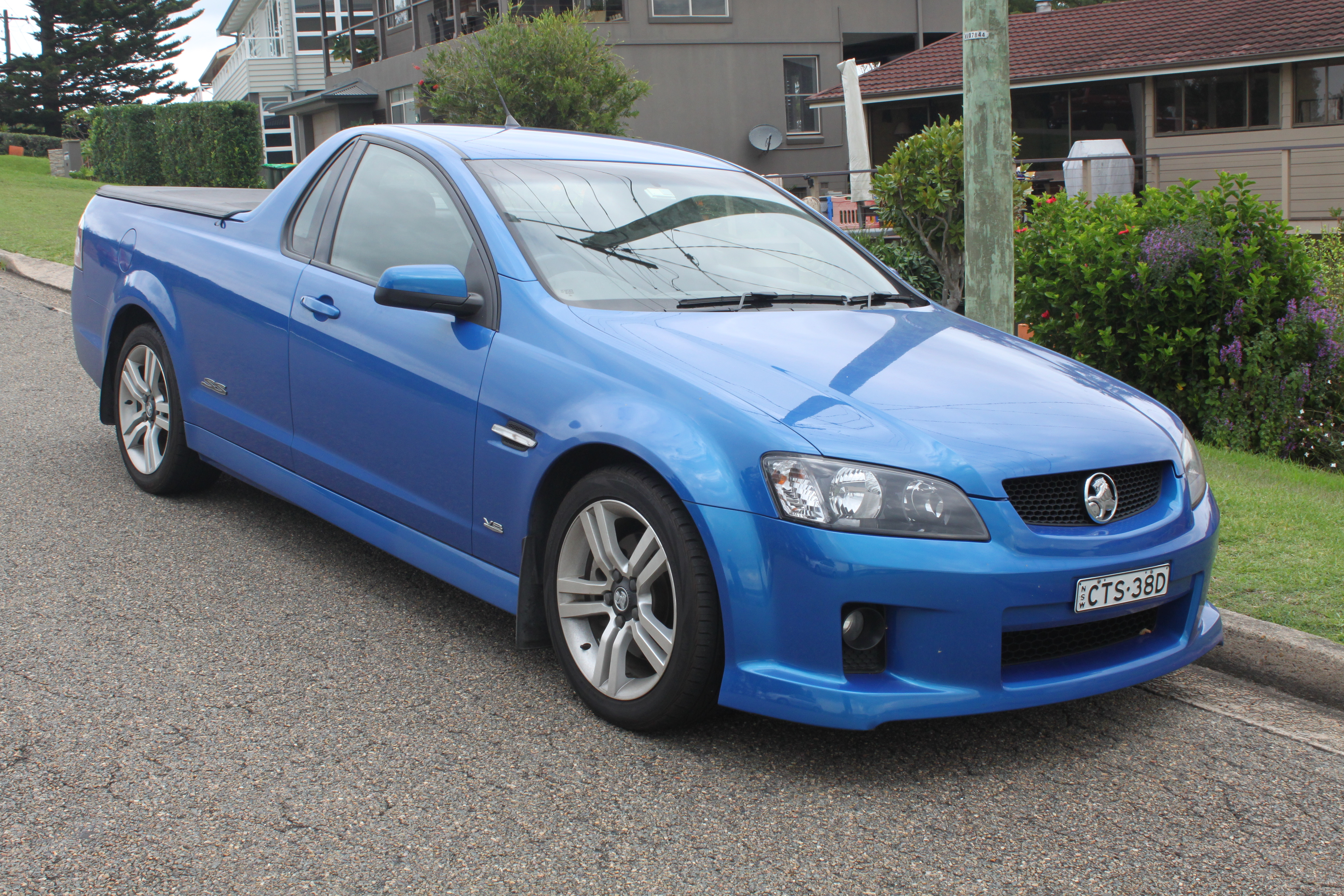 Holden VE SS Ute